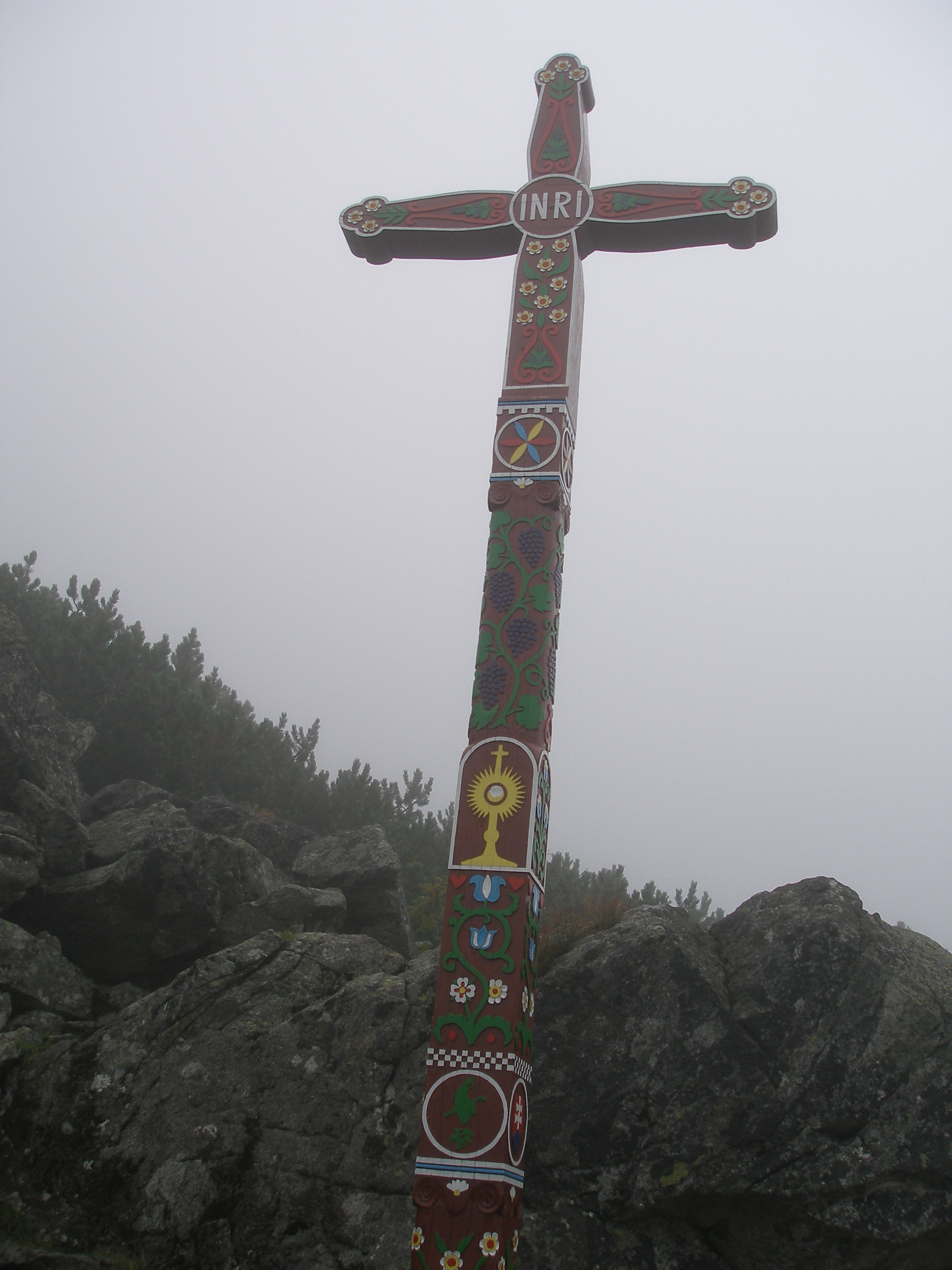 Areál Symbolického cintorína pri Popradskom plese. Veľký 6 metrový detviansky kríž pri vstupe od Popradského plesa.